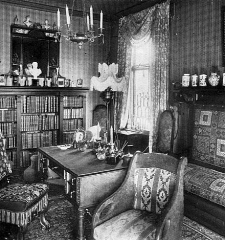 Villa Adolfsbergs skrivrum